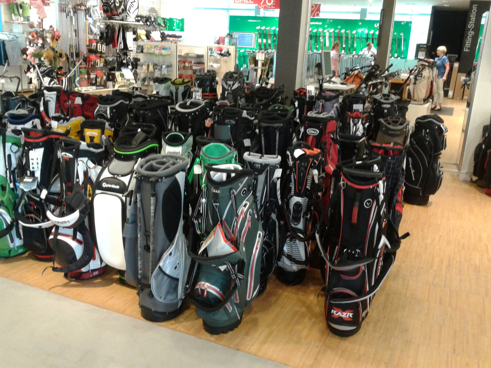 Die Golfabteilung im Sportgeschäft Engelhorn sports in Mannheim